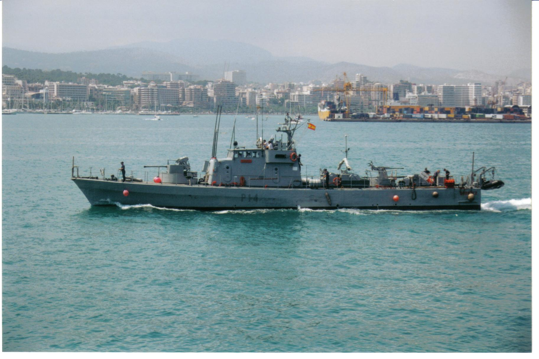 Patrullero Ordoñez (P-14) de la Armada Española